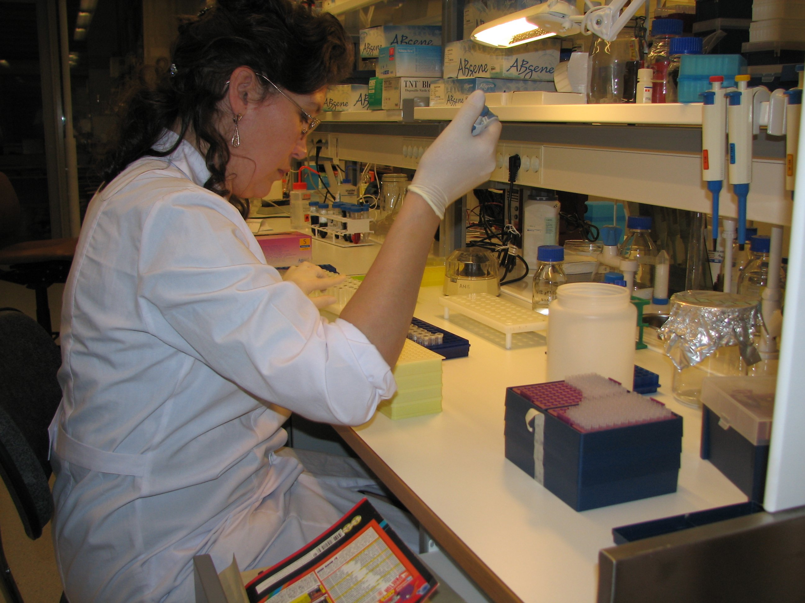 Светлана Боронникова, стажировка в университете Хельсинки